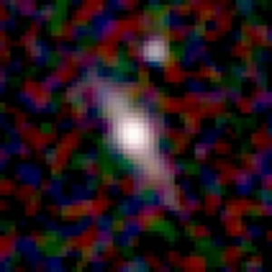 Galaxy NGC 4